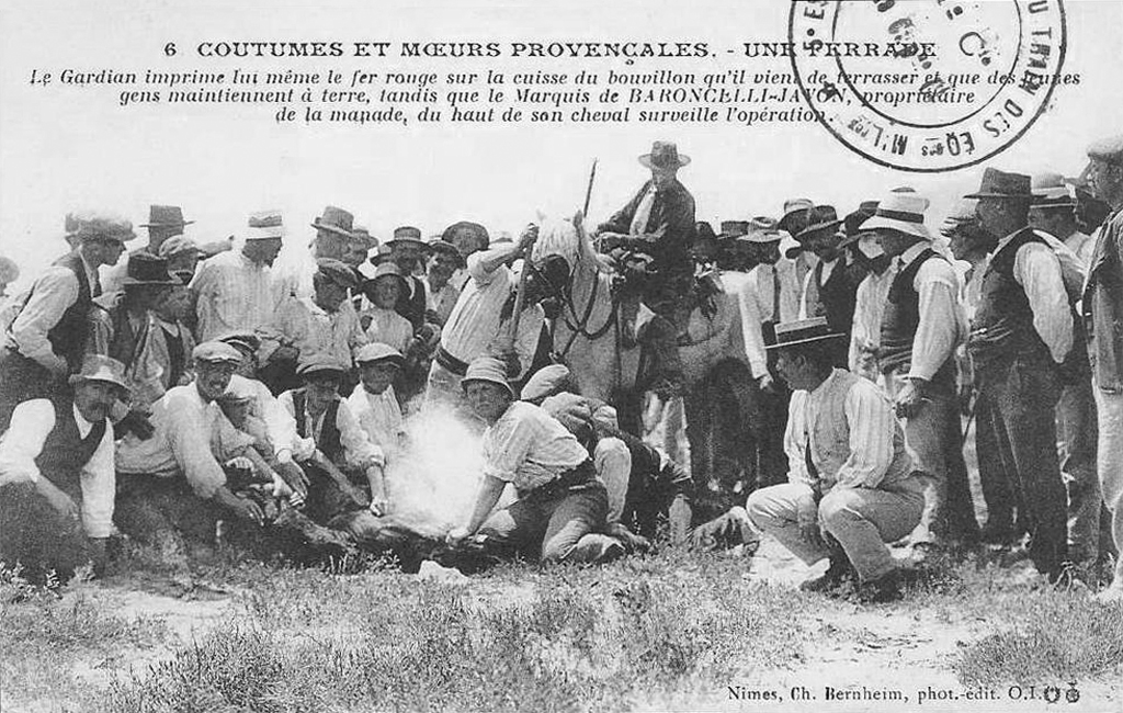 Ferrade à la manade du marquis de Baroncelli-Javon au tout début du XXe siècle.